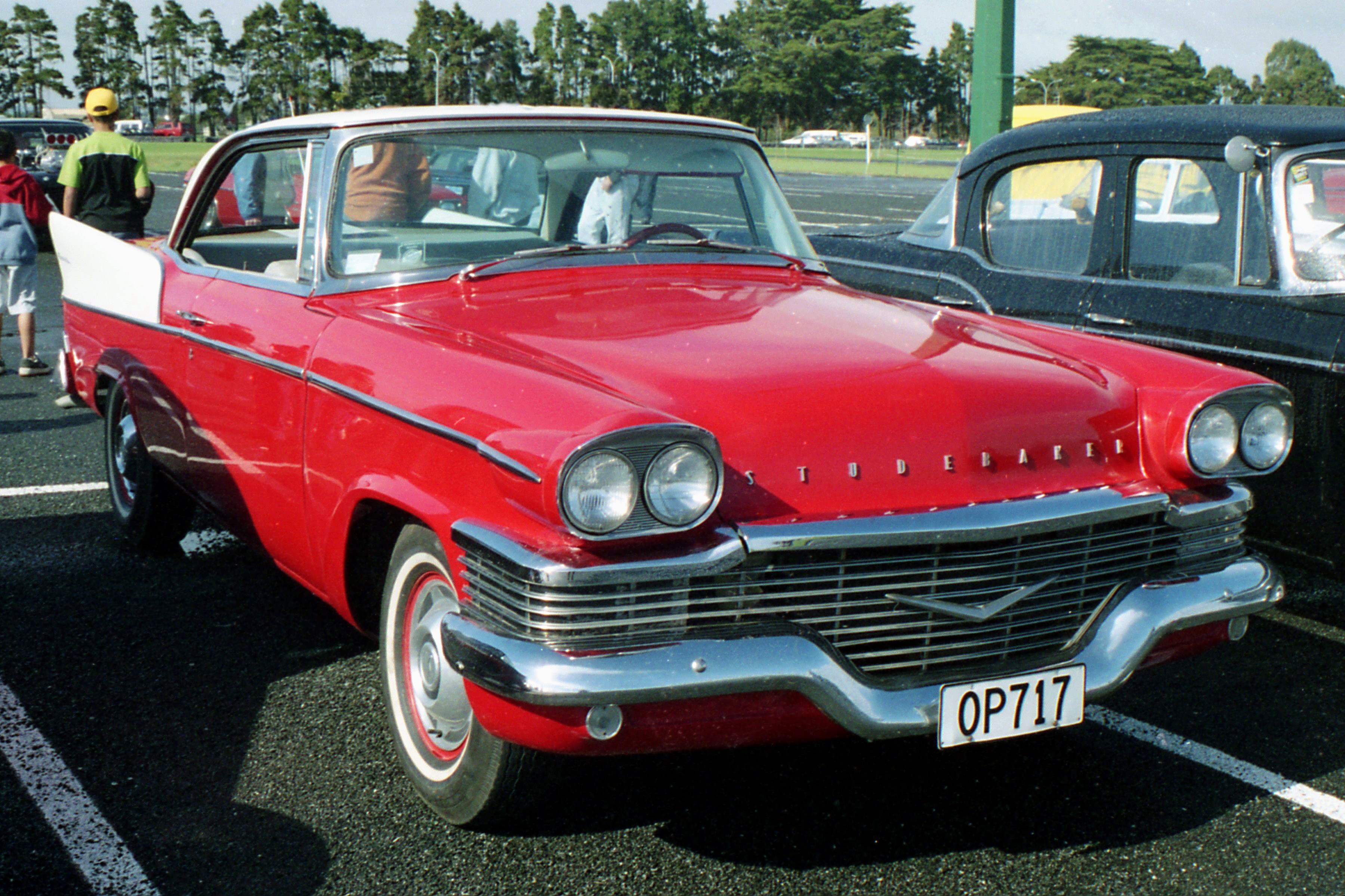 1958 Studerbaker